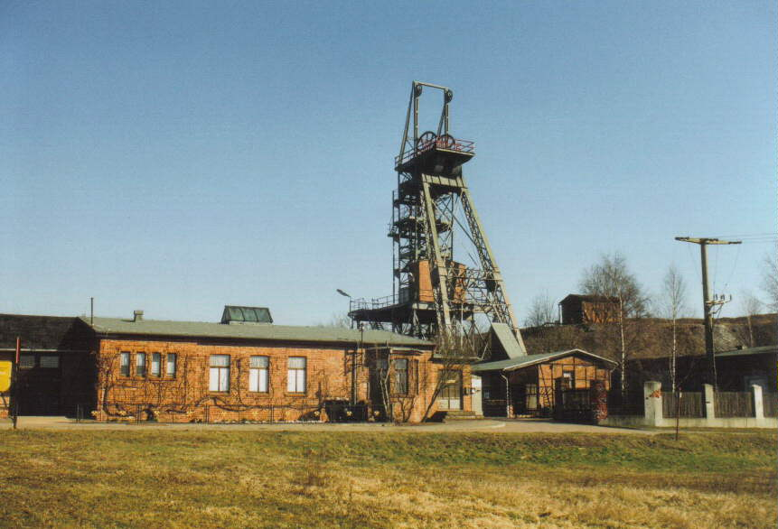 Ehemaliges Kupferbergwerk Röhrigschacht in Wettelrode (Sangerhausen).